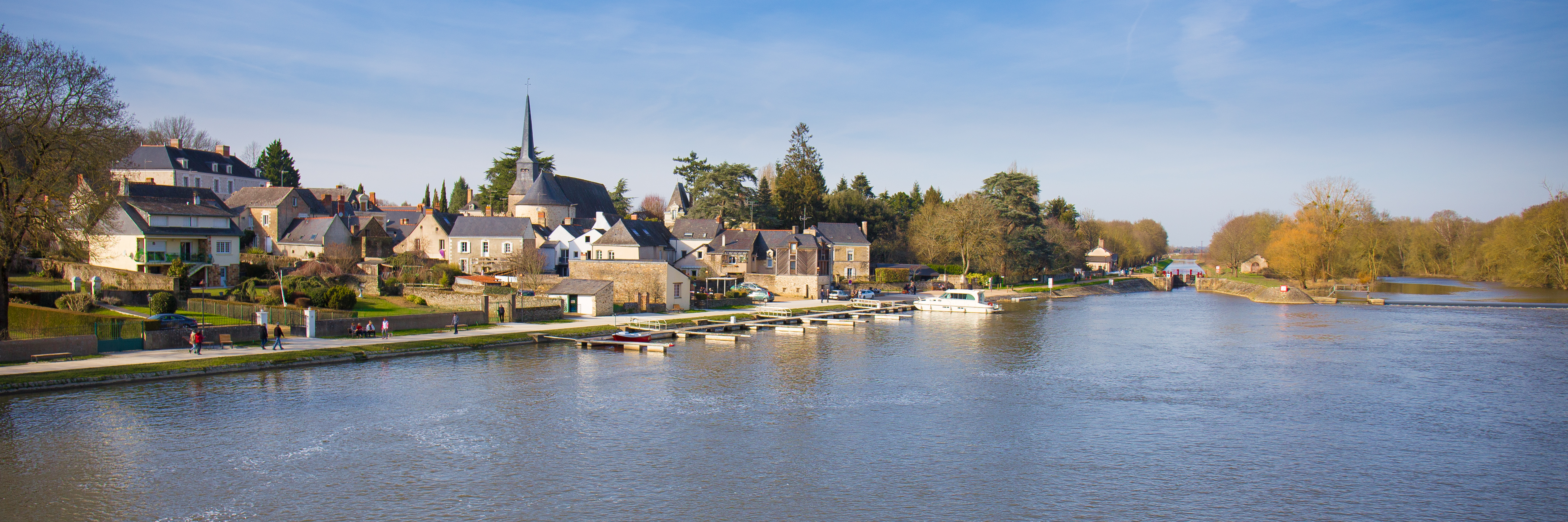 Le quai de l'Hirondelle et l'écluse à Grez-Neuville (Maine-et-Loire, France).